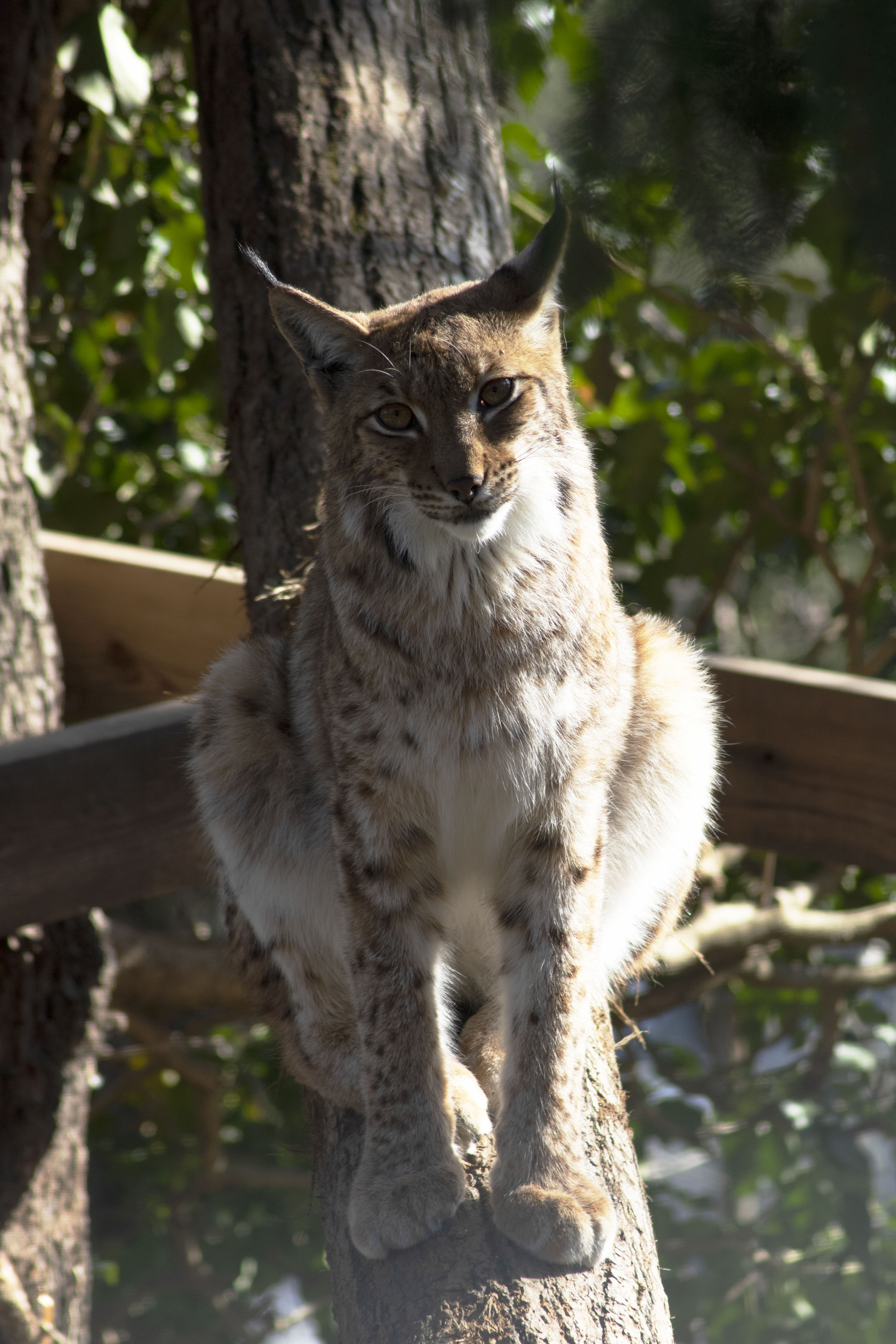 Luchsdame im Alpenzoo